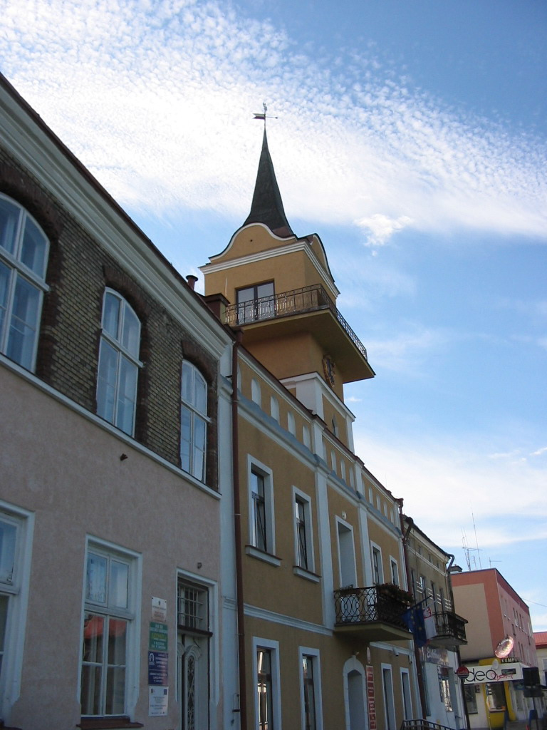 Ratusz w Lubaczowie 05.1994.